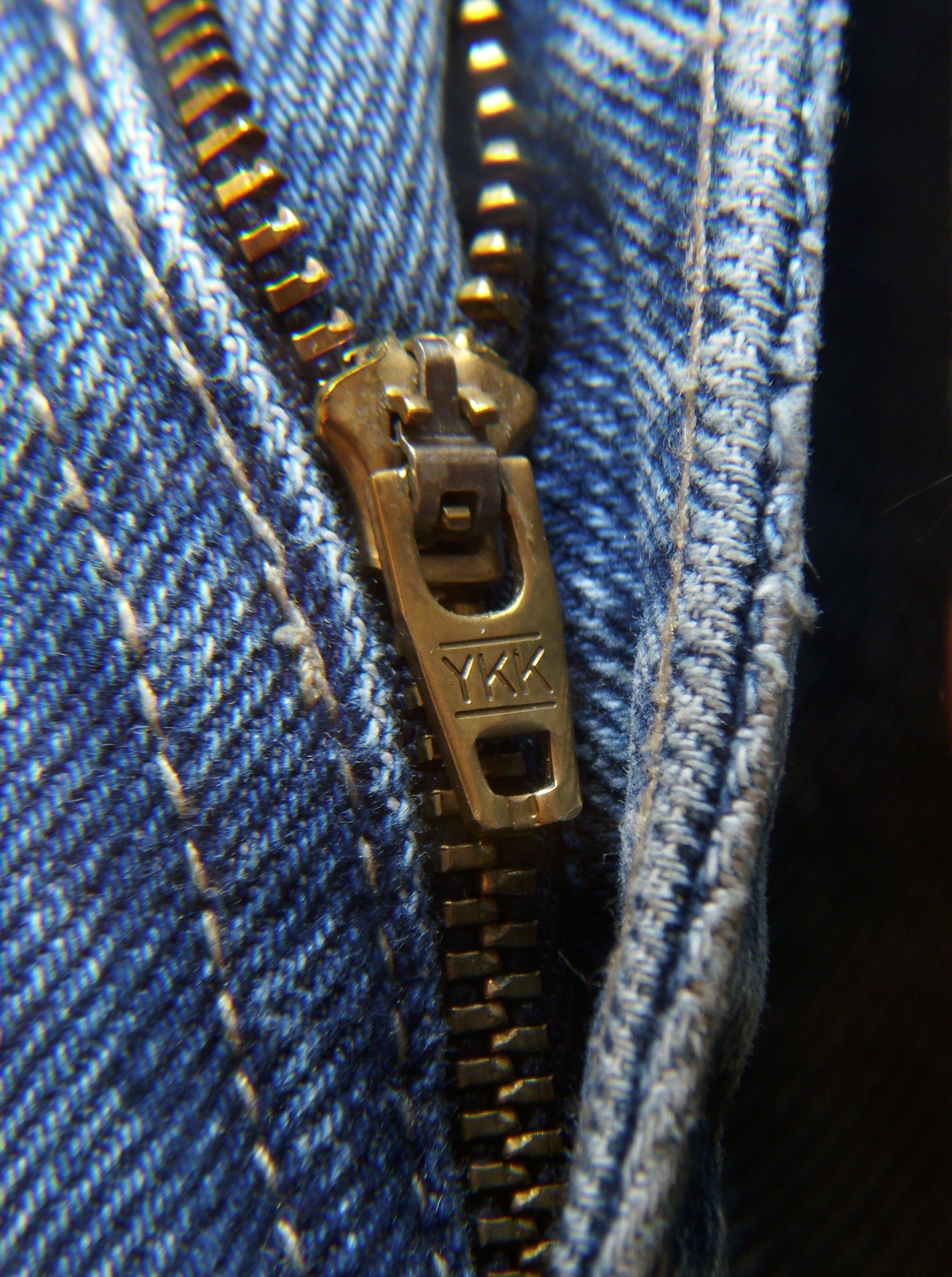 Una fotografía macro de una cremallera (cierre) de la compañía YKK adherida a mezclilla (jeans).